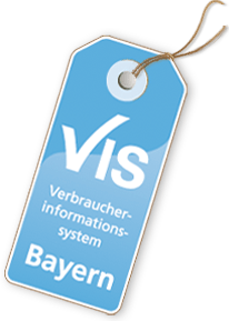 Das Logo des Verbraucherportals VIS Bayern.